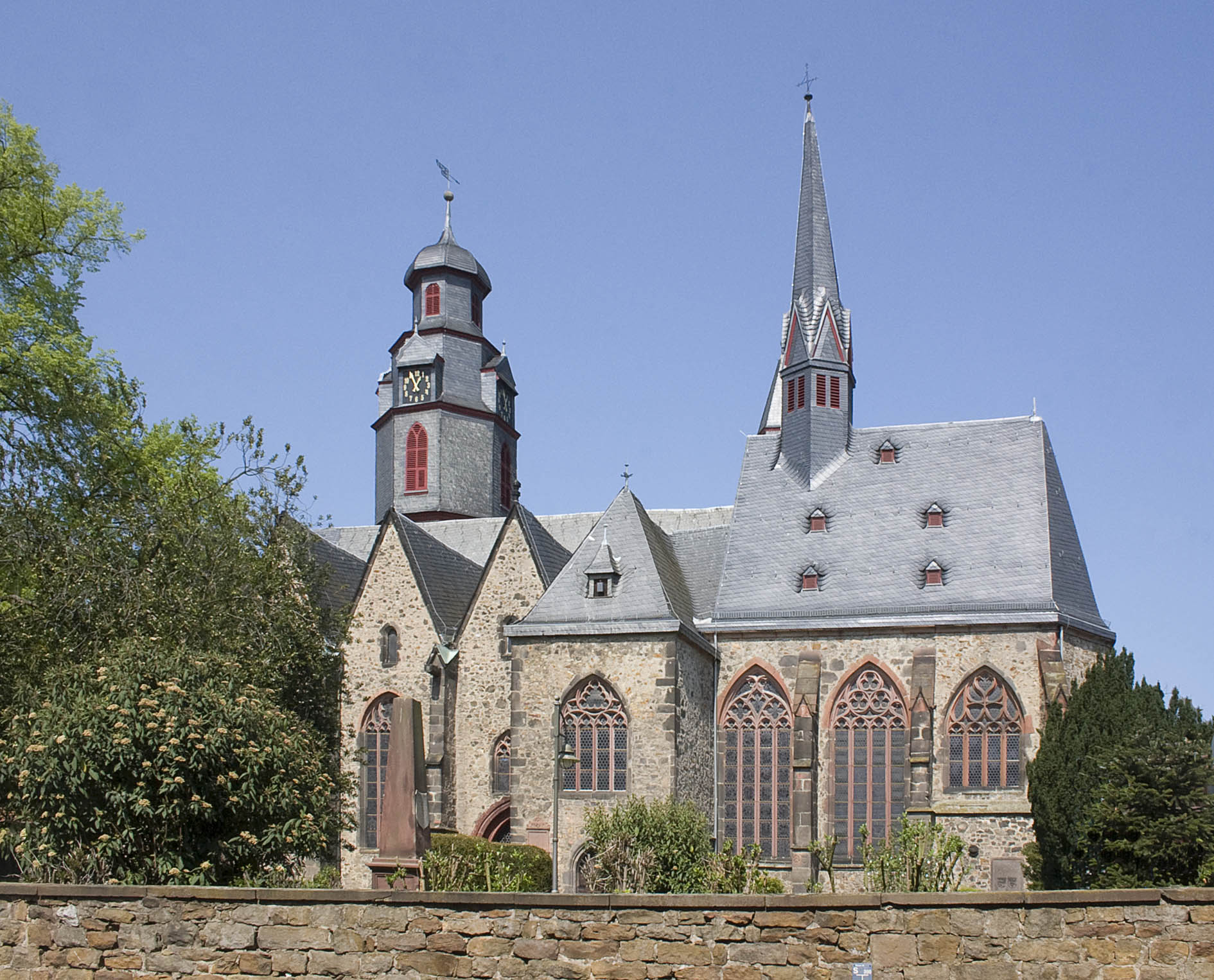 Markuskirche (evangelische Stadtkirche), Butzbach in Hessen, Deutschland